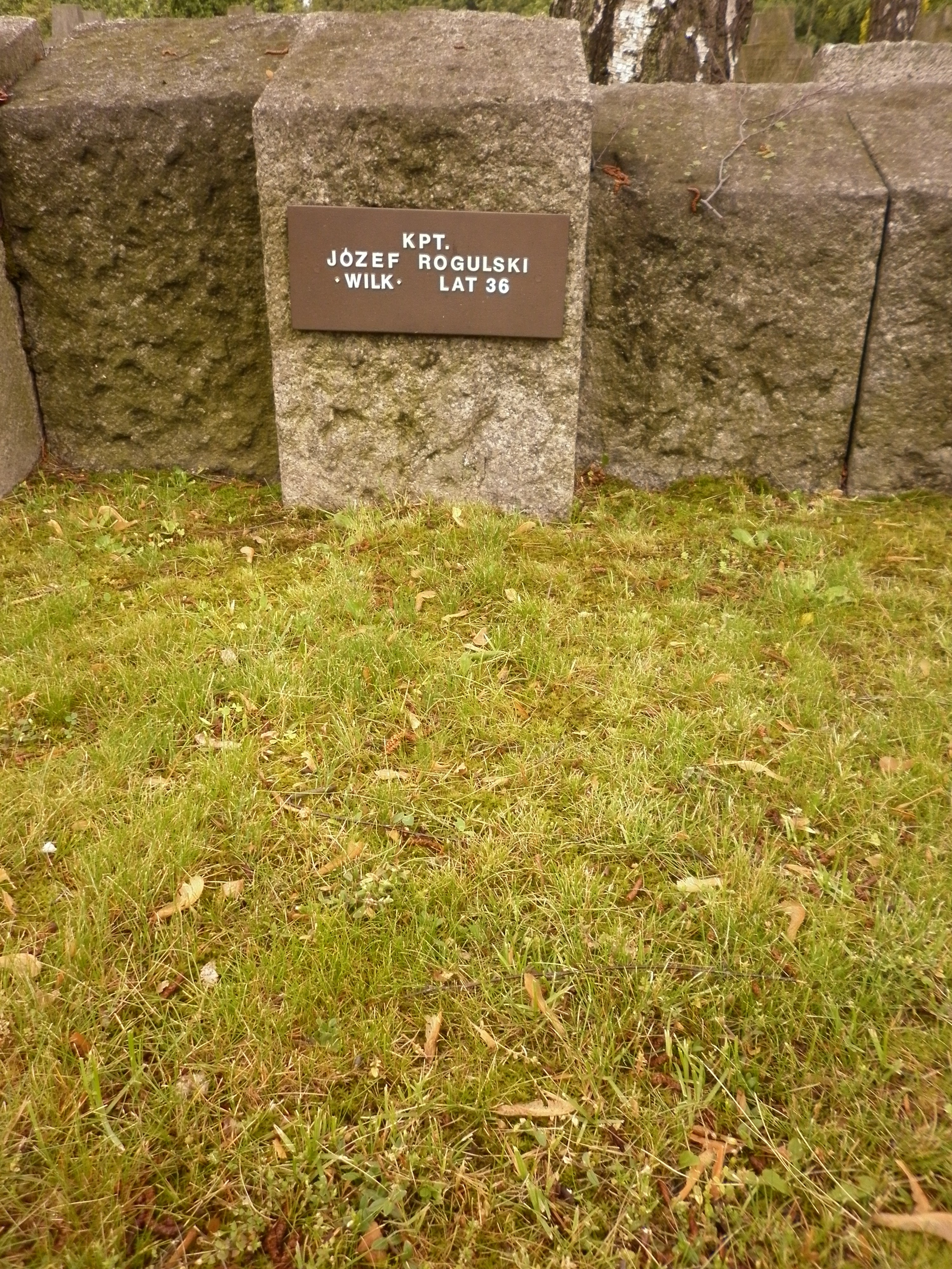 Grób Józefa Rogulskiego na Cmentarzu Wojskowym na Powązkach